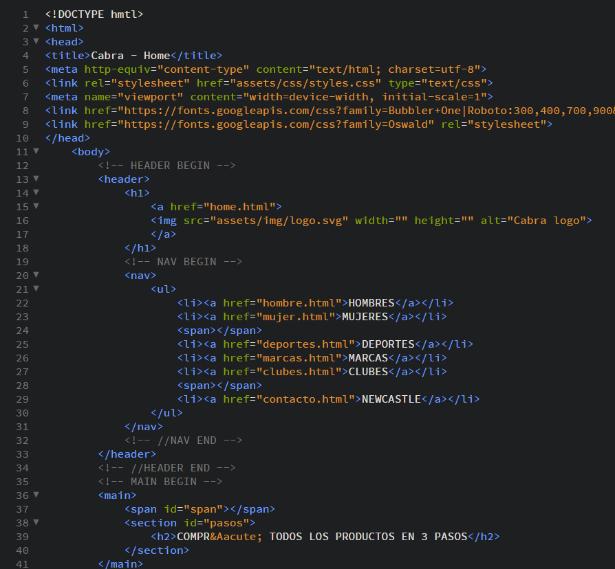 Código de web del header de una pagina para utilizar como ejemplo.